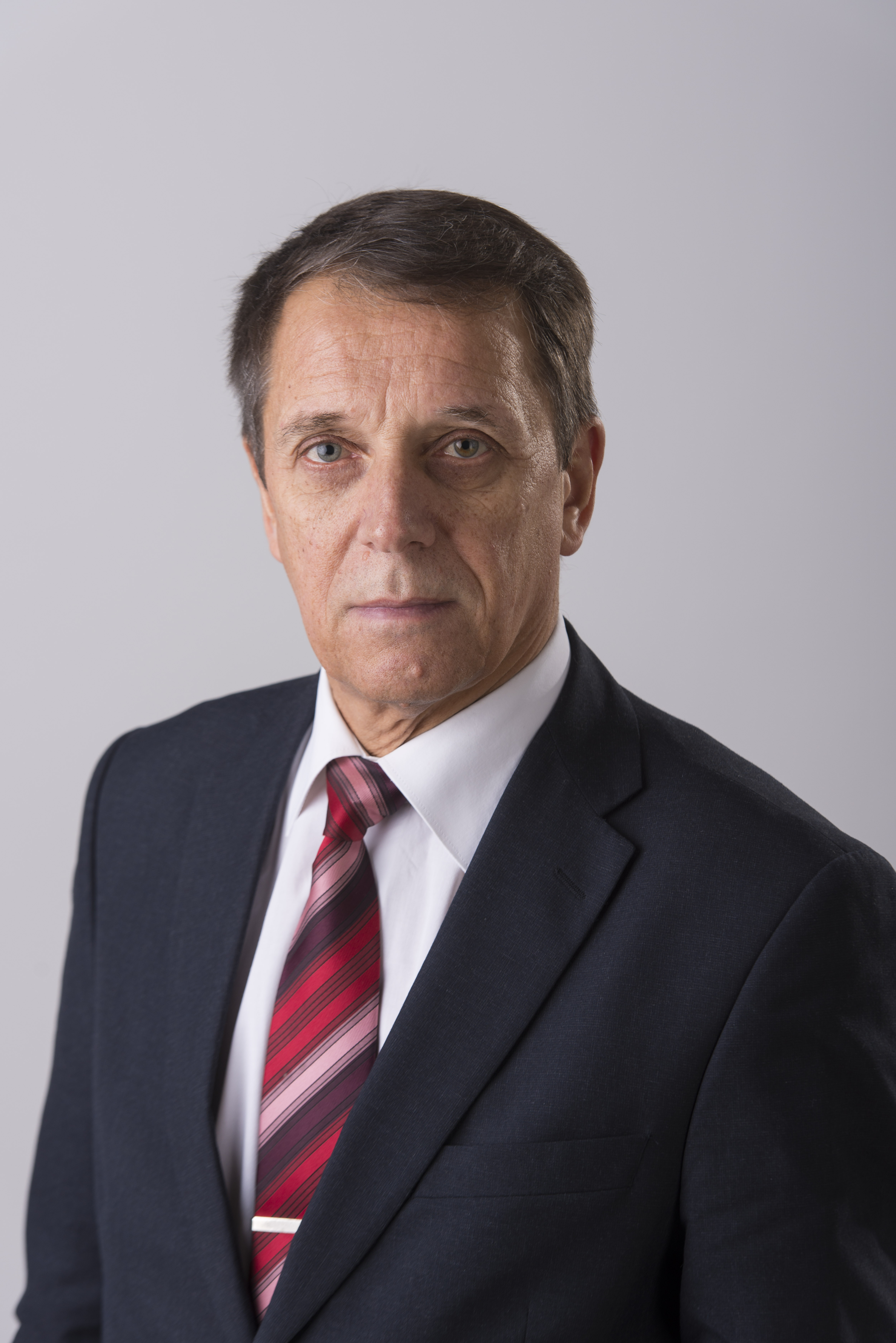 2014.gada 9.decembris. 12.Saeimas deputāts Juris Šulcs. Foto: Reinis Inkēns, Saeimas Kanceleja Izmantošanas noteikumi: saeima.lv/lv/autortiesibas